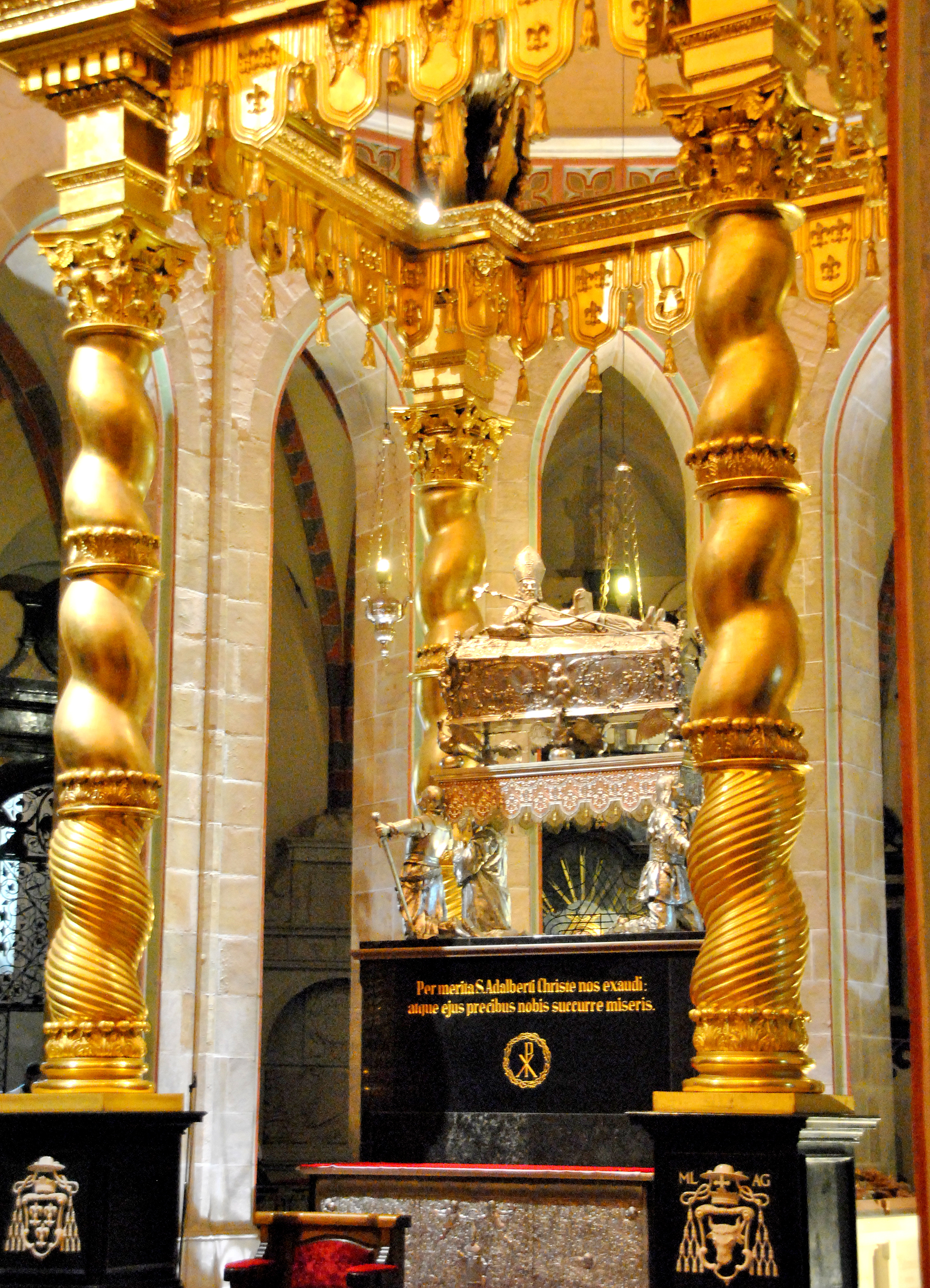 Relikwiarz św. Wojciecha w katedrze Gnieźnieńskiej